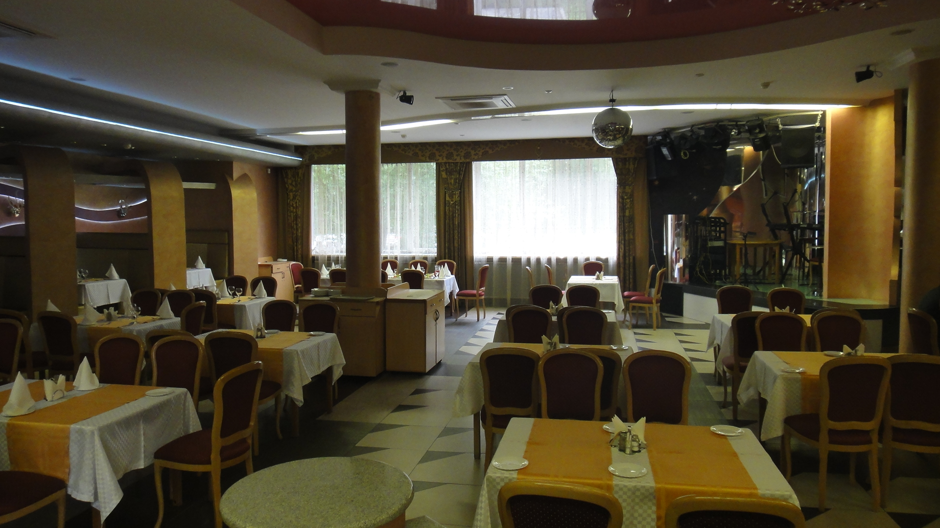 Ресторан Дома учёных (Новосибирский Академгородок)